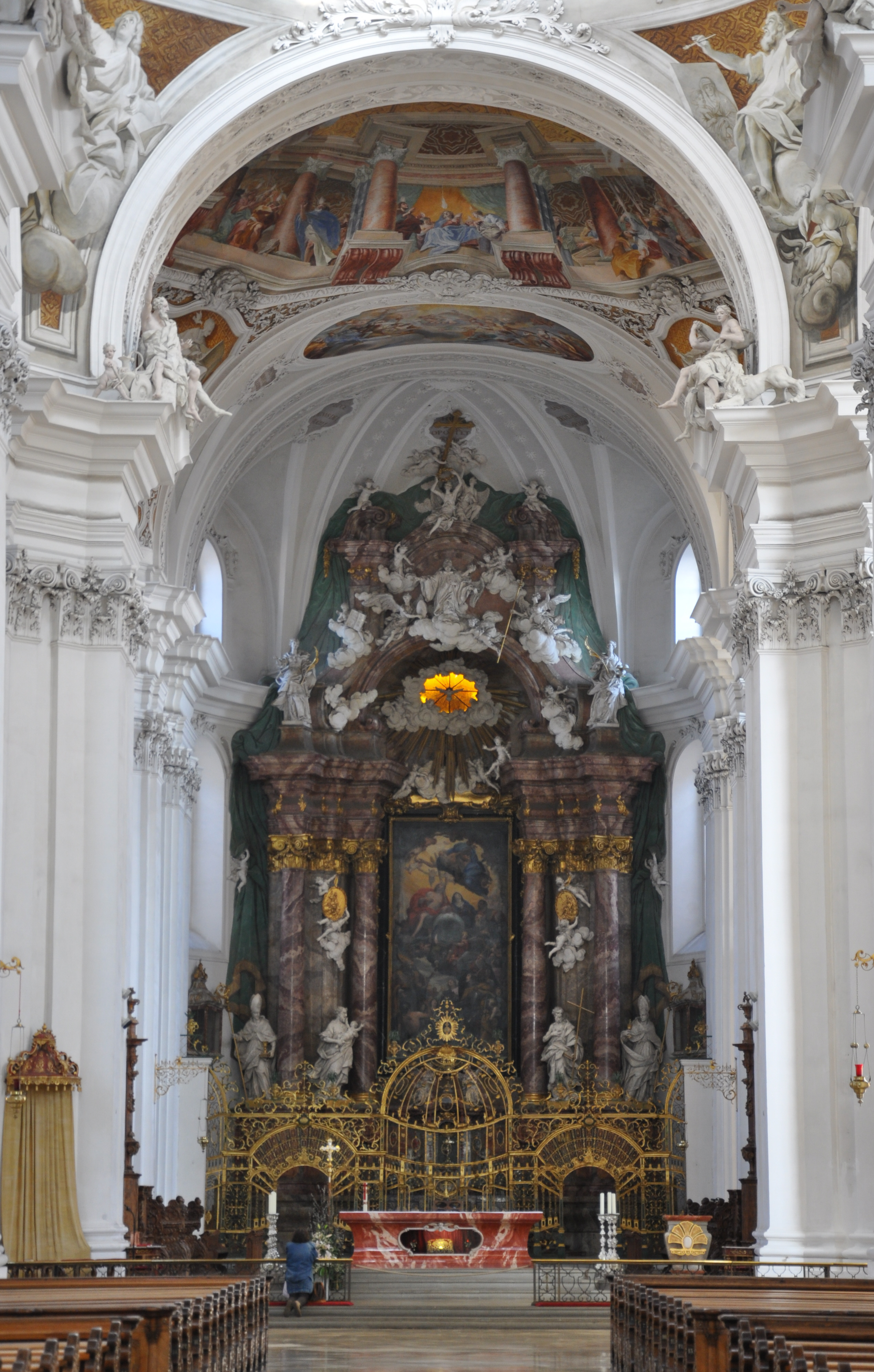 Hochaltar der Basilika St. Martin und Oswald, Weingarten (Württemberg). Altarbau und Scagliola-Arbeiten von Giacomo Antonio Corbellini, 1718. Stuckfiguren St. Josef, St. Johannes der Täufer, hl. Alto und hl. Konrad sowie sämtliche anderen Skulpturen von Diego Francesco Carlone, 1719–1723. Altarblatt Die hl. Dreifaltigkeit mit Maria und den Patronen der Kirche von Giluio Benso mit St. Longinus u. a. Heiligen.